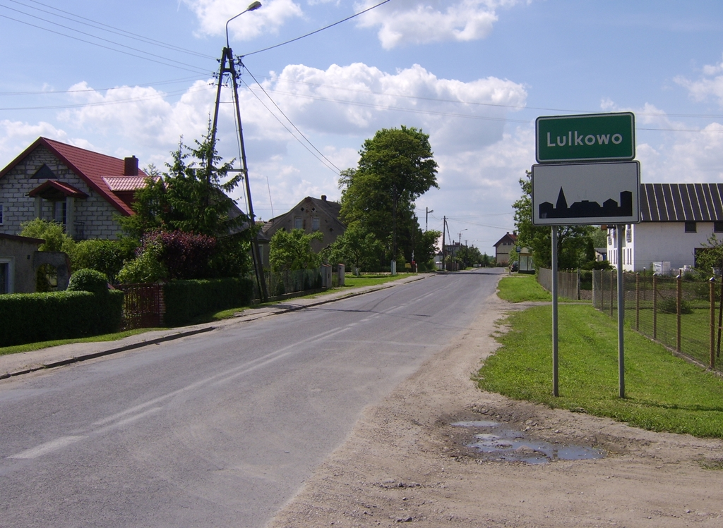 Tablica miejscowości